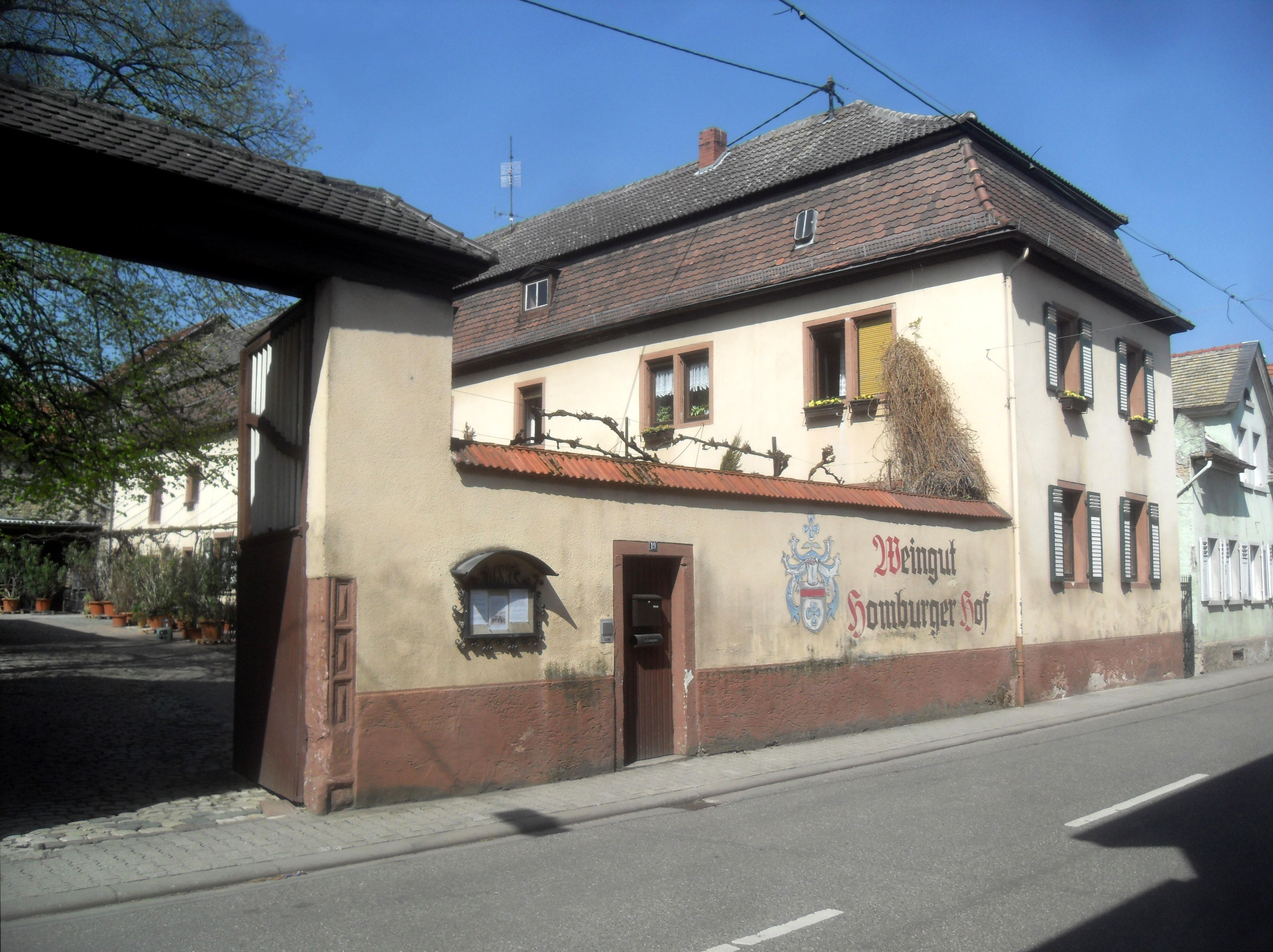 Der Homburger Hof im rheinhessischen Guntersblum in Deutschland von der Alsheimer Straße aus